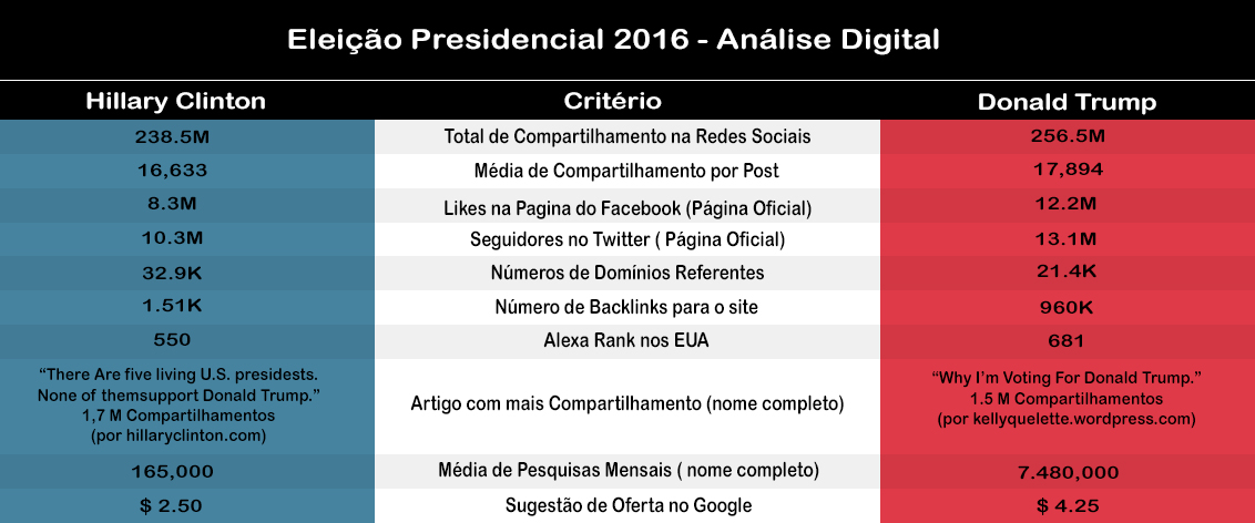 Análise digital da corrida presidencial dos EUA 2016